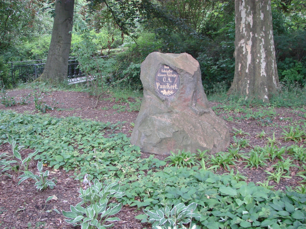 Paukertgedenkstein im Stadtpark in Treuenbrietzen, steht unter Denkmalschutz. Paukert war der Schöpfer der Parkanlage